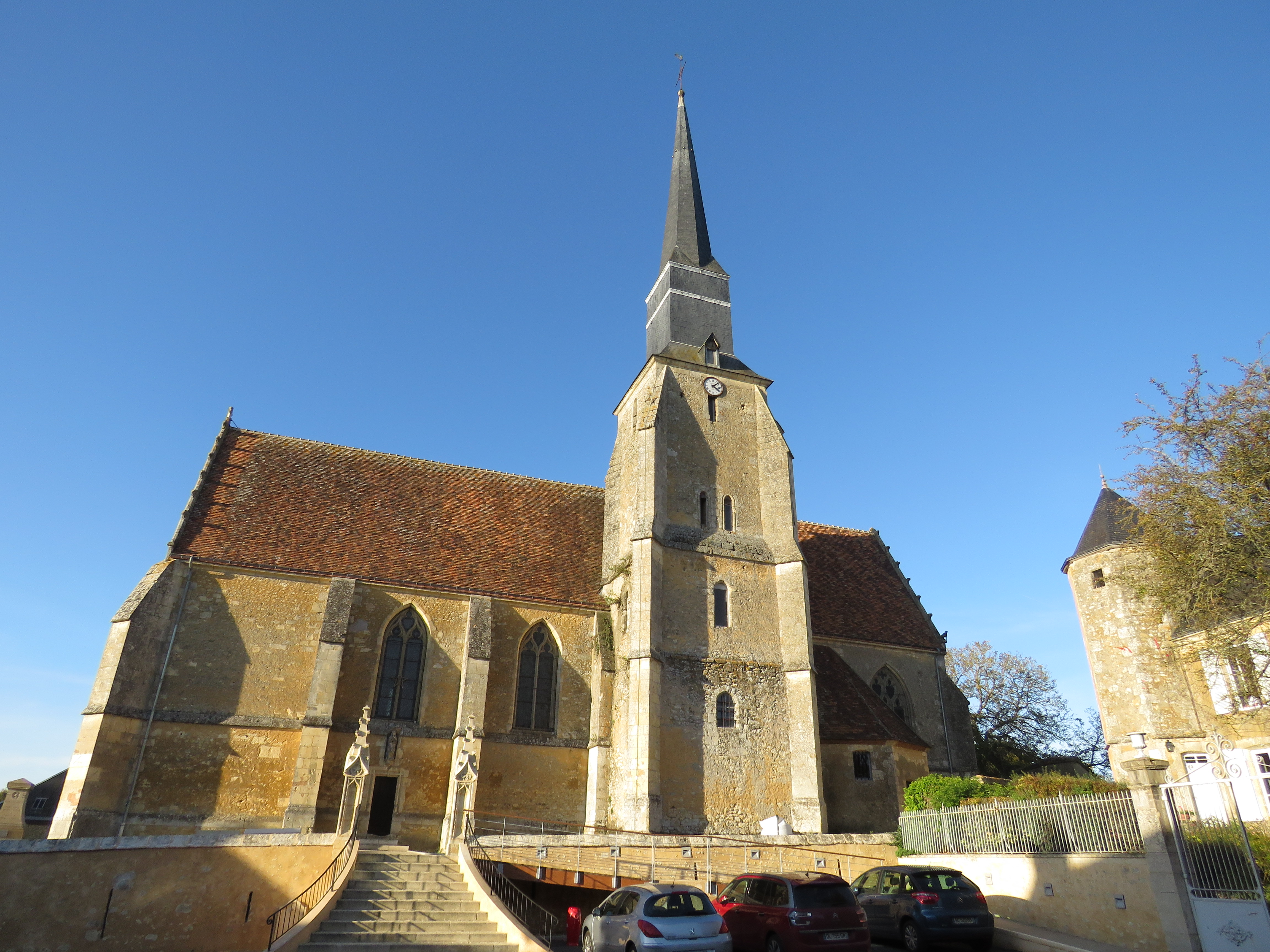 Église